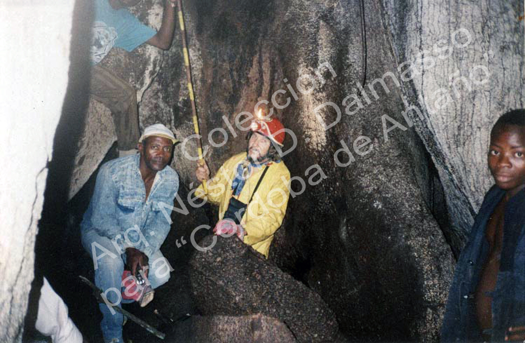 Livio Incatasciato 16 Añizok-2P